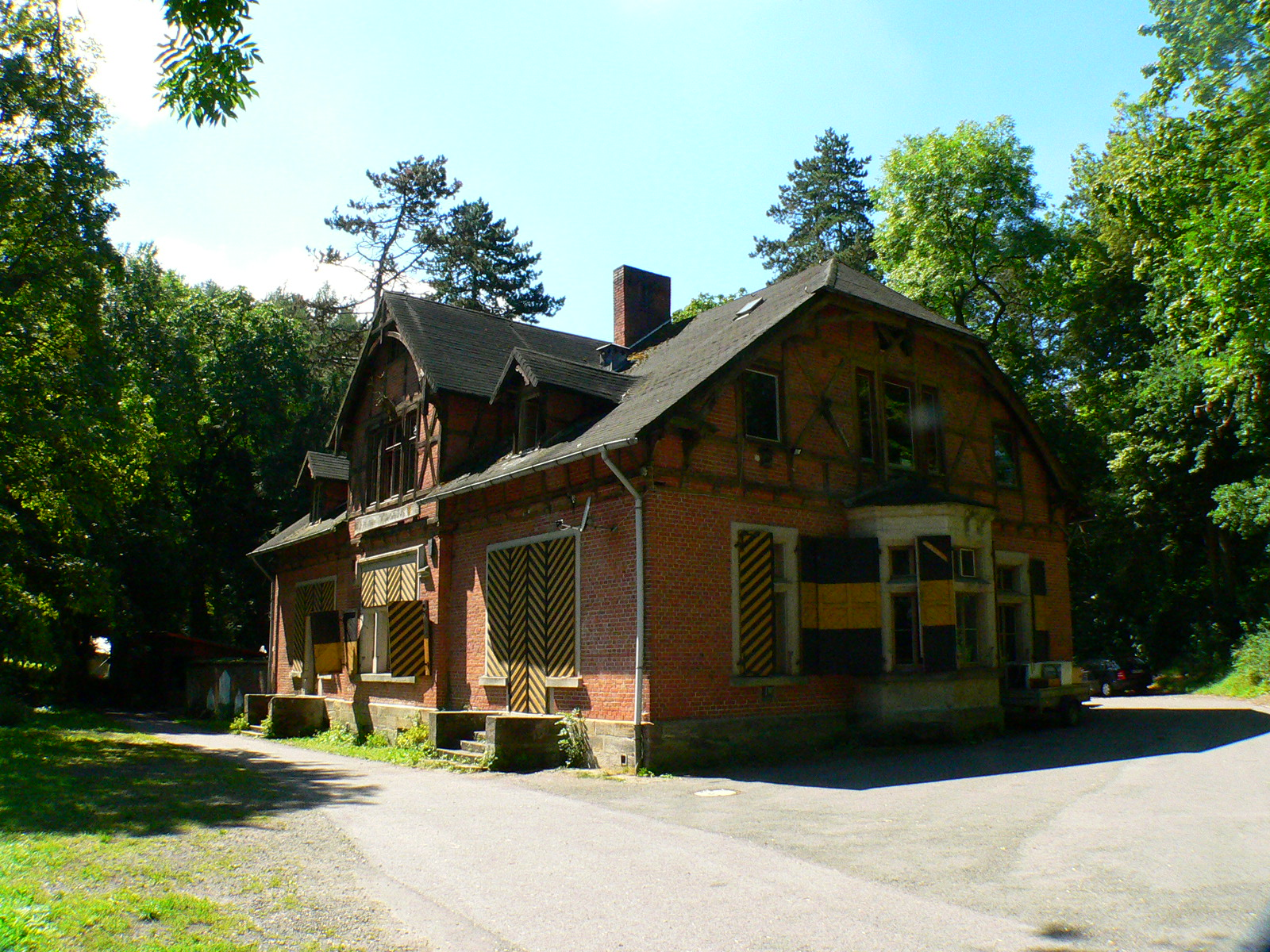 Schloss Callenberg bei Coburg (Germany, Bavaria): Ehemalige Schlossgaststätte, heute Pfadfinderheim